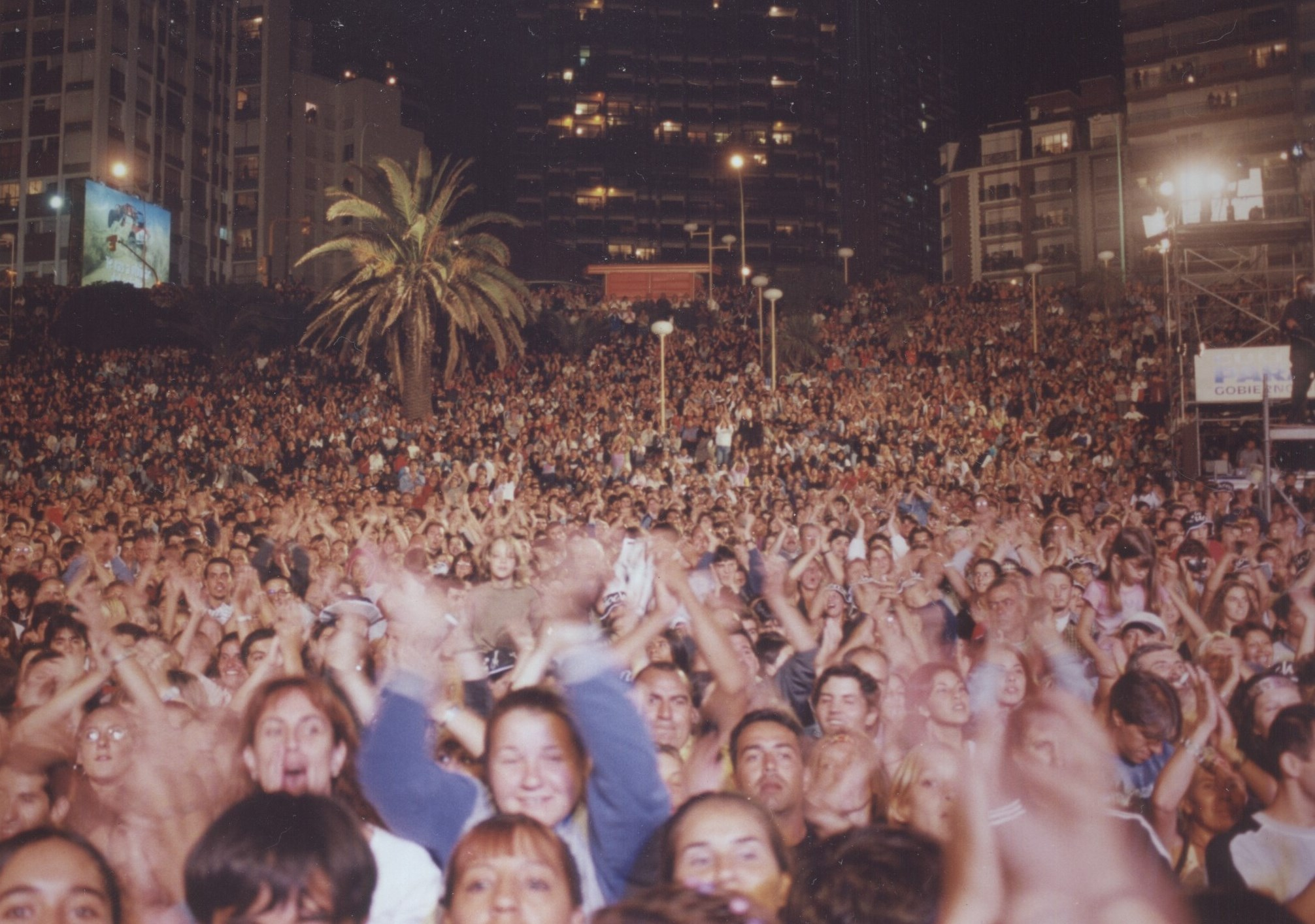 Miles de personas disfrutaron del festival Cultura para Todos en Mar del Plata, organizado por el área cultural a cargo de Eduardo García Caffi.